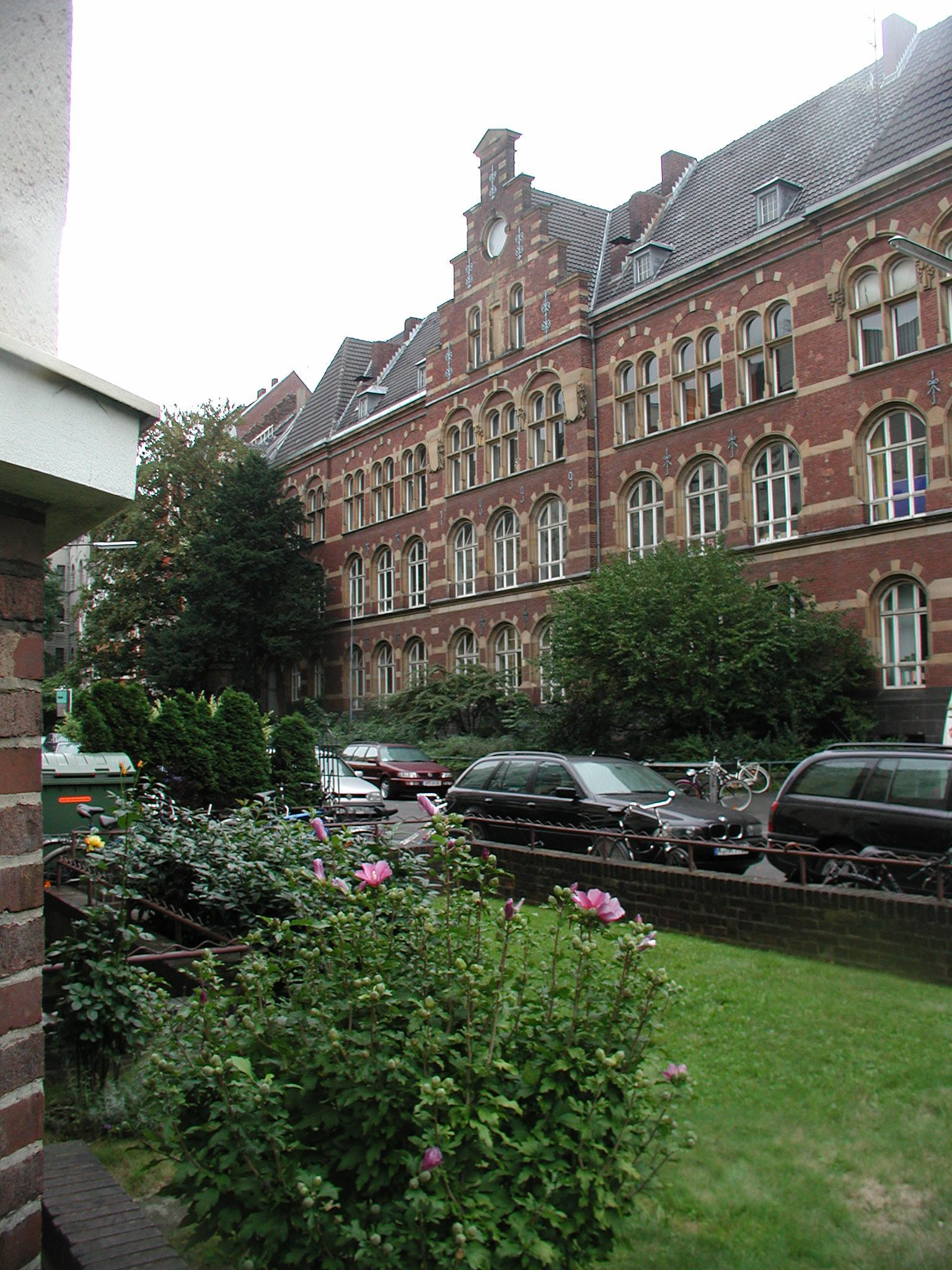 Köln Innenstadt-Süd, Lochnerstraße This is a photograph of an architectural monument.